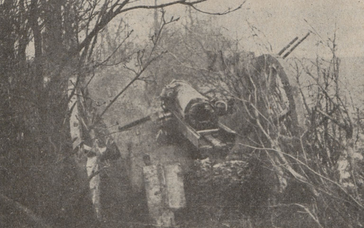 Canon de 75 mm du 33e RAC dans le bois d'Esnes en mai 1916